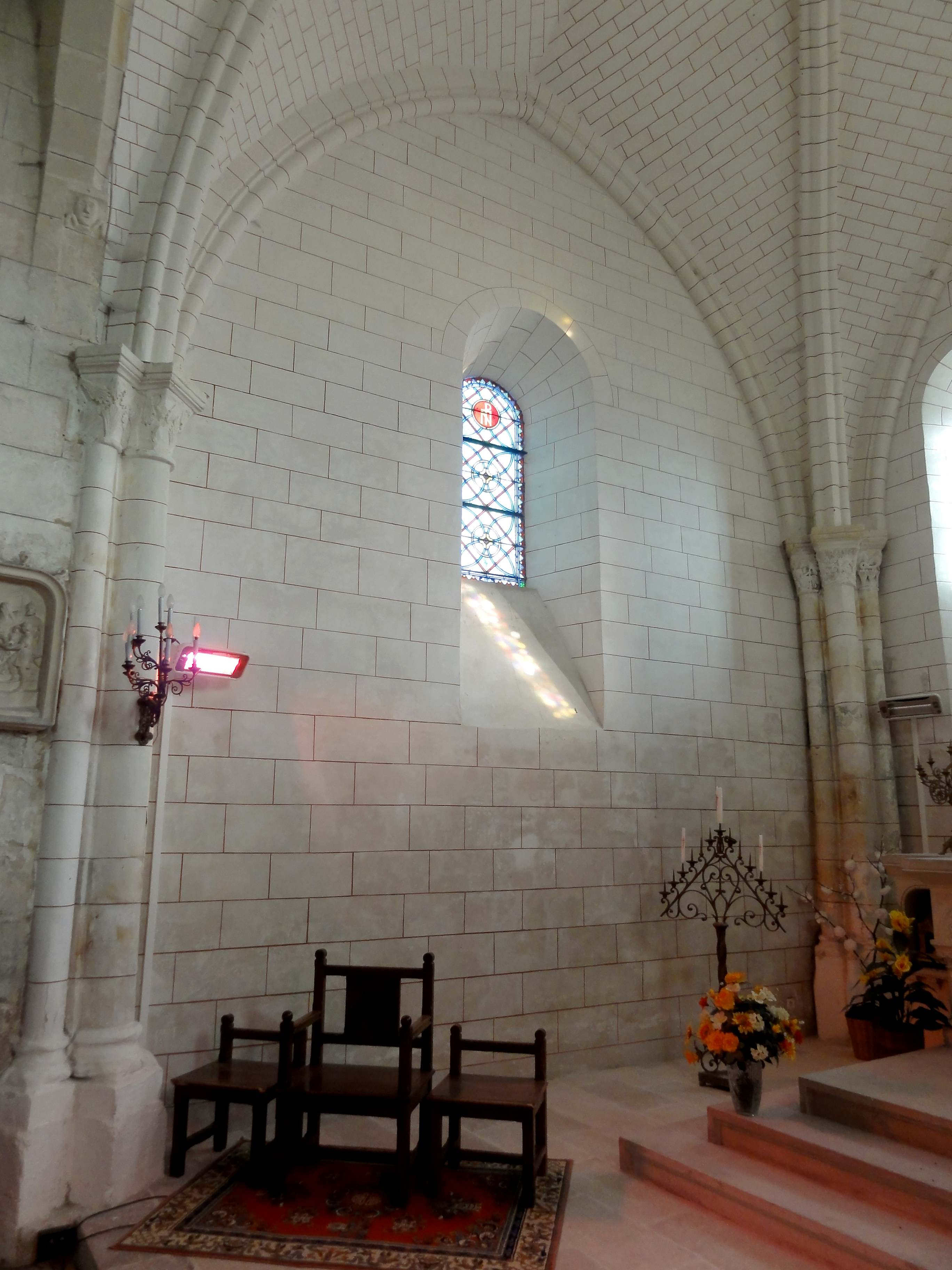 Abside, côté nord.